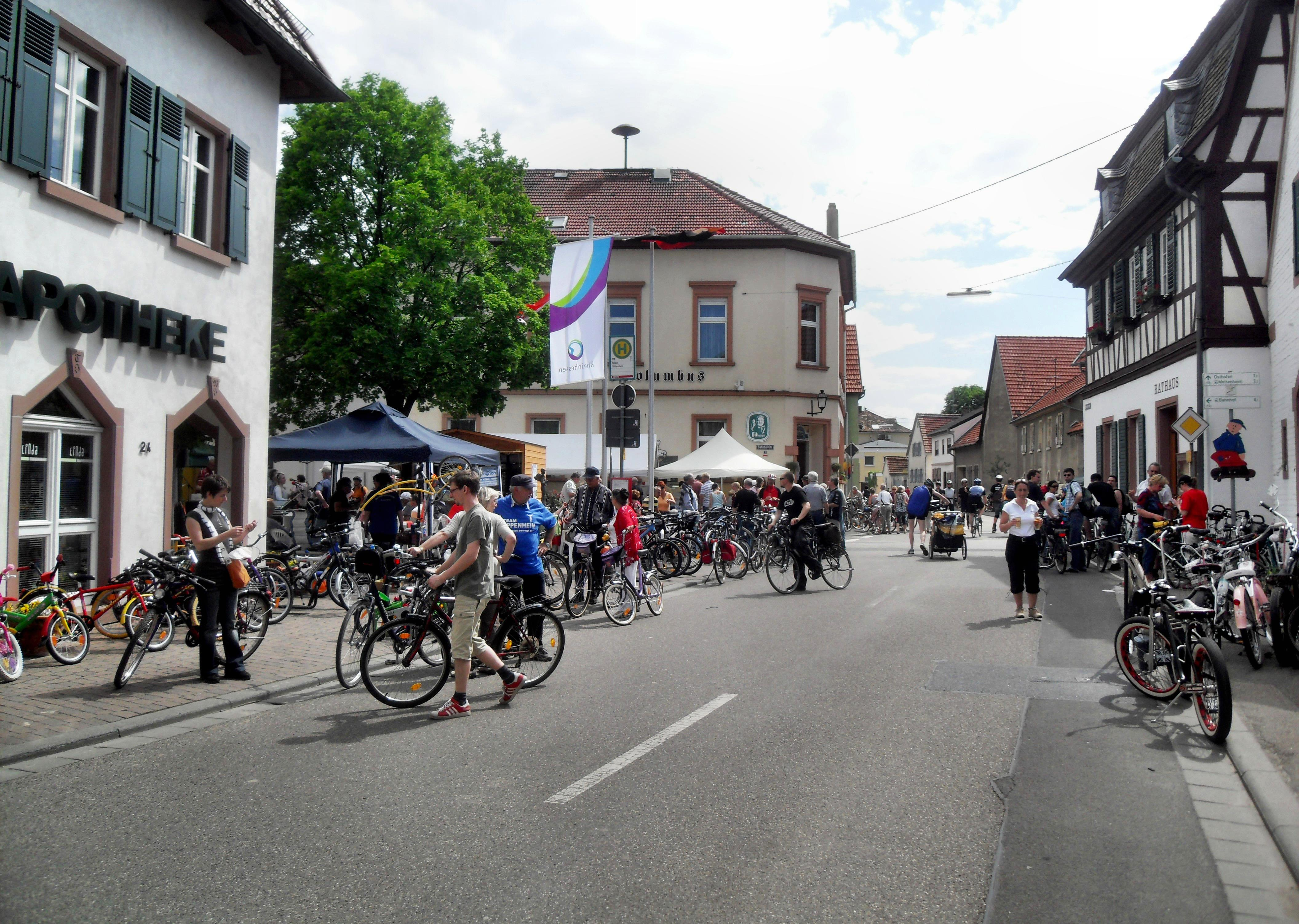 Die Bachstraße im rheinhessischen Alsheim in der Nähe des Rathauses (Blickrichtung Worms) während der Veranstaltung „Rheinradeln“ in Rheinland-Pfalz (Deutschland)